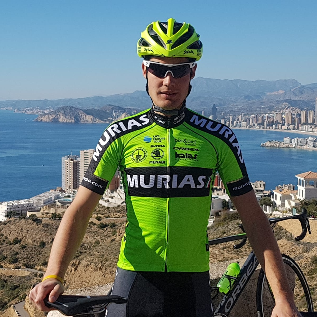 Juan Antonio López Cózar durante la concentración de equipo en Benidorm. Enero 2019